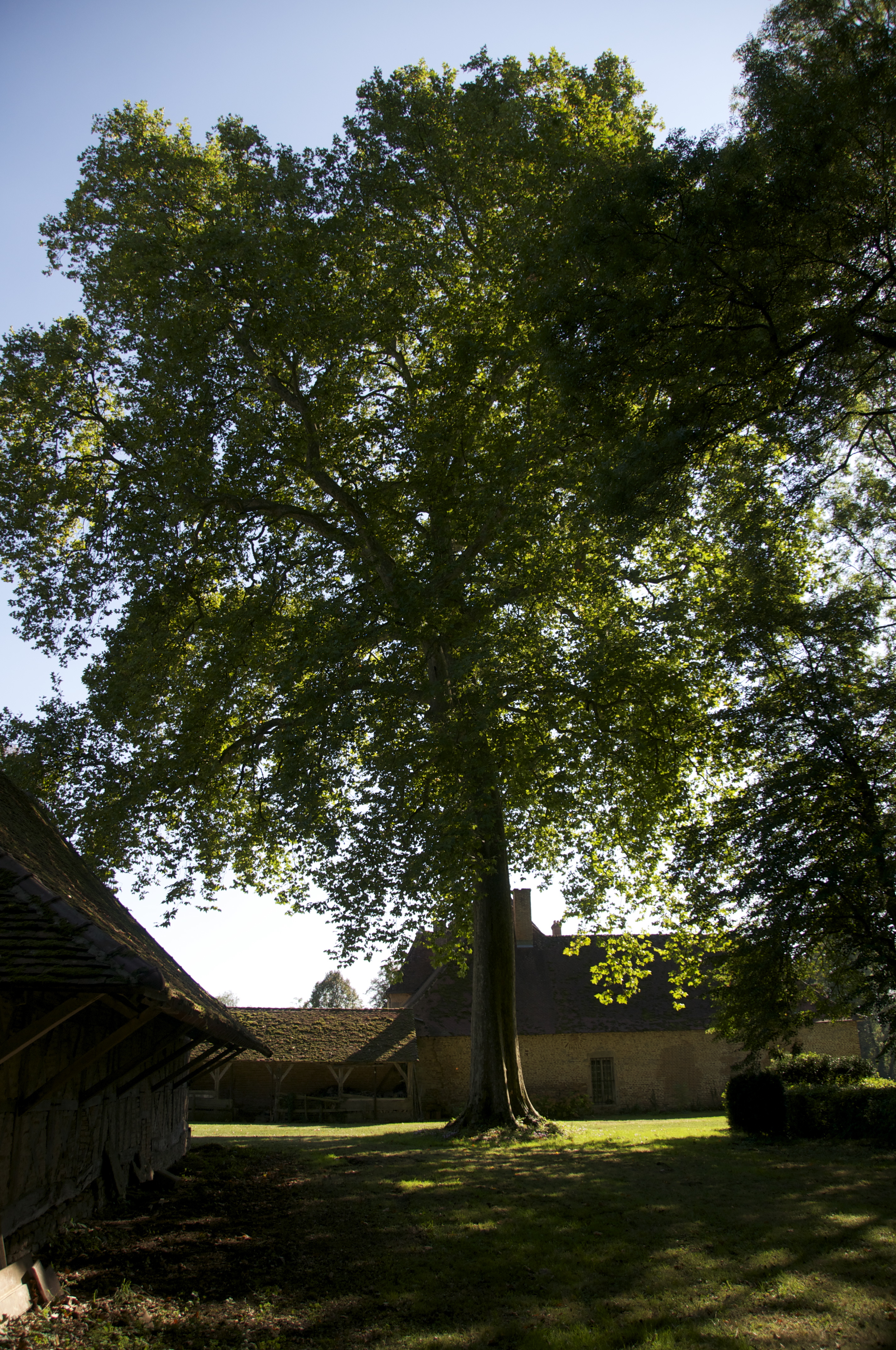 Magnifique platane de Saone et loire - 42,5 mètres